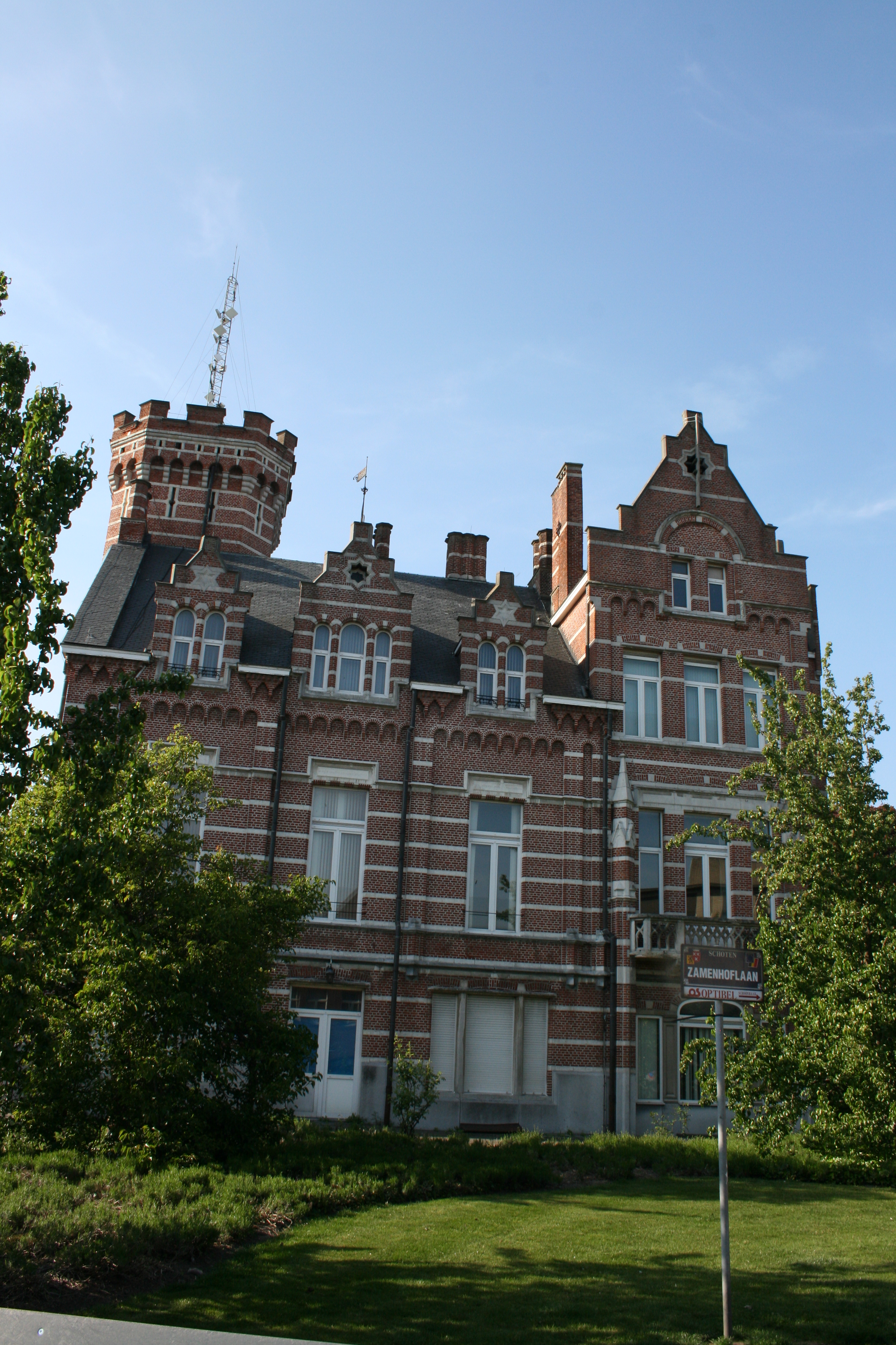 Kasteel Gelmelenhof in Schoten, gezien vanuit de Zamenhoflaan